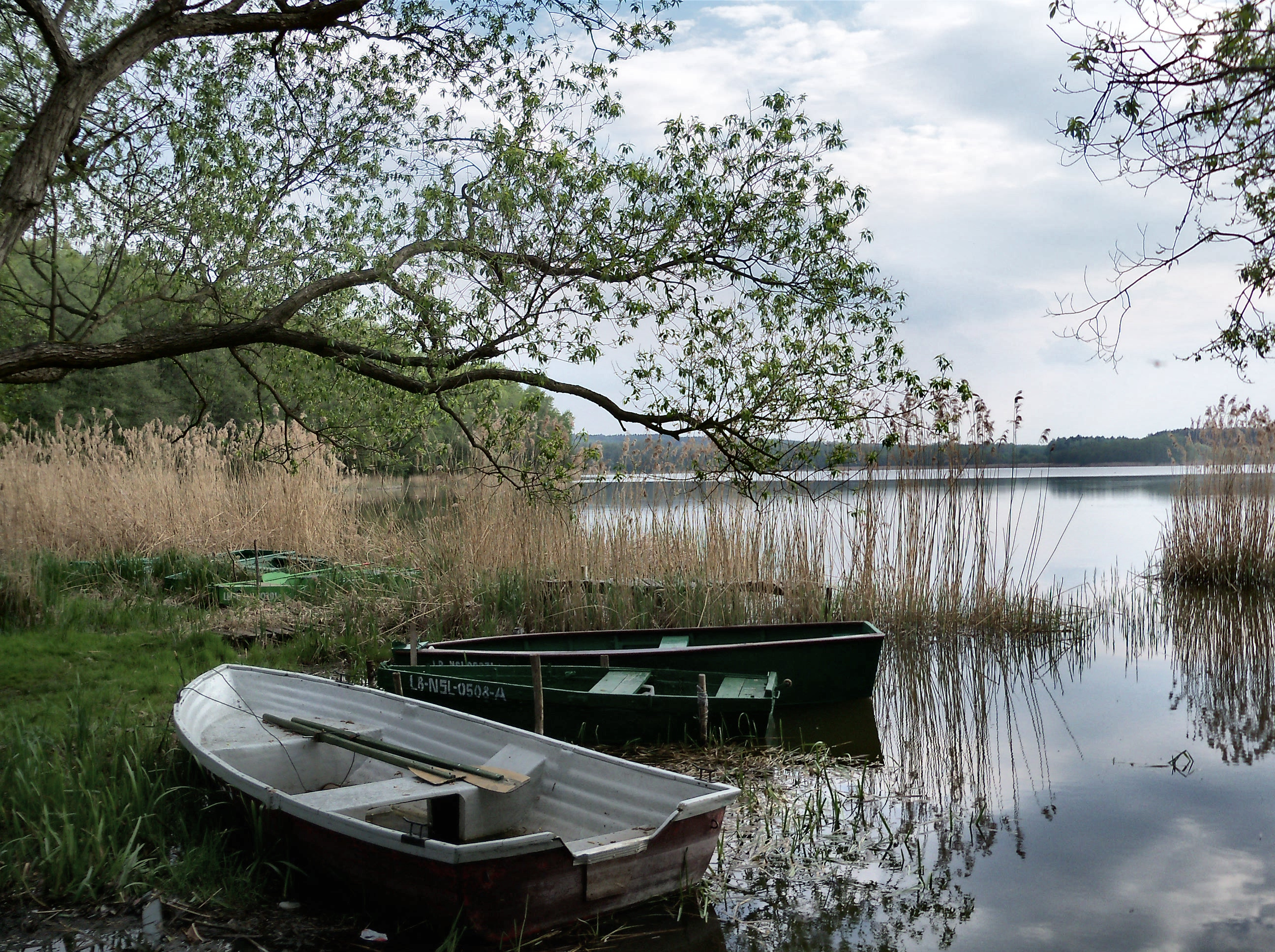 Jezioro Lgiń Mały This is a photography of Natura 2000 protected area with ID PLB300011